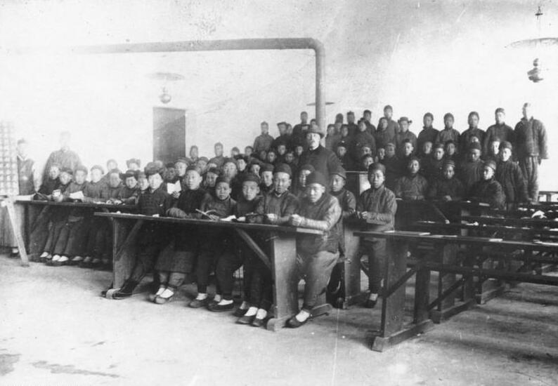 China, Tsingtau, Werft, Lehrlinge China, Tsingtau Tsingtau Werft; Lehrlingsschule